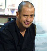 ליאת אזר בסדרה המקום